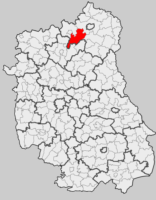 Map of gmina Drelów, Biała Podlaska county, Lublin voivodship Mapa gminy Drelów, powiat bialski, województwo lubelskie